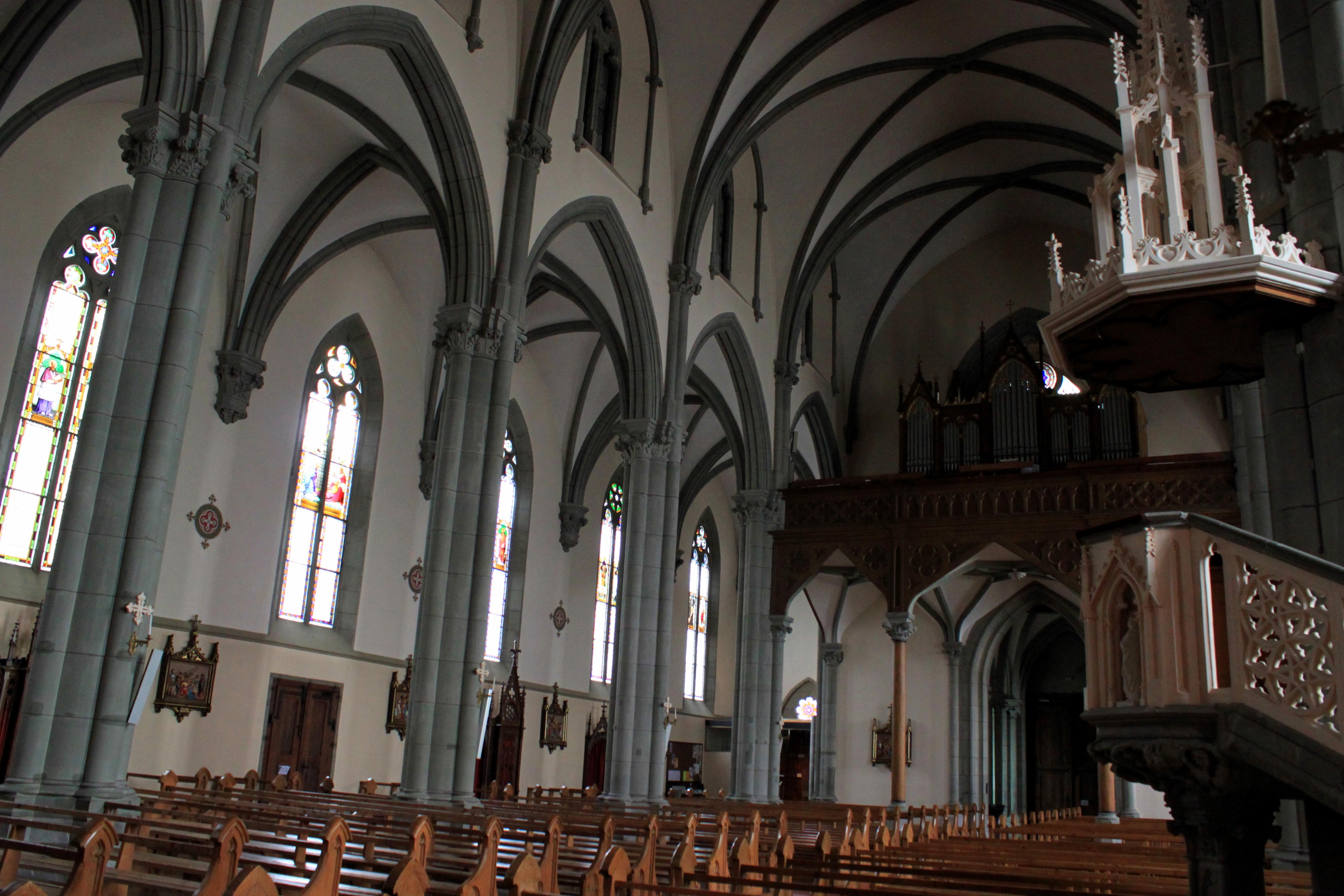 Suisse, canton de Fribourg, Châtel-Saint-Denis, église.